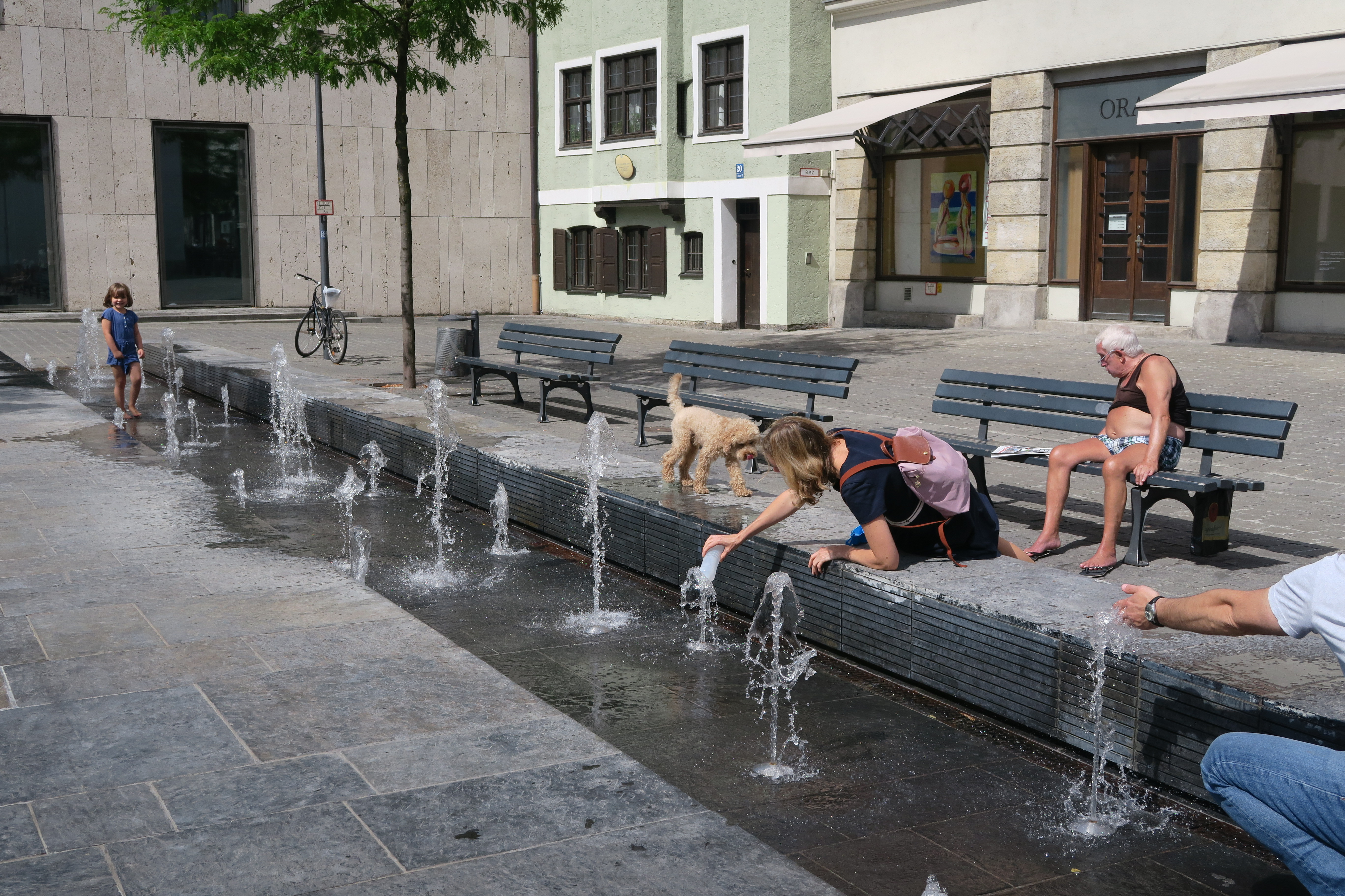 Brunnen auf dem St.-Jakobs-Platz in München